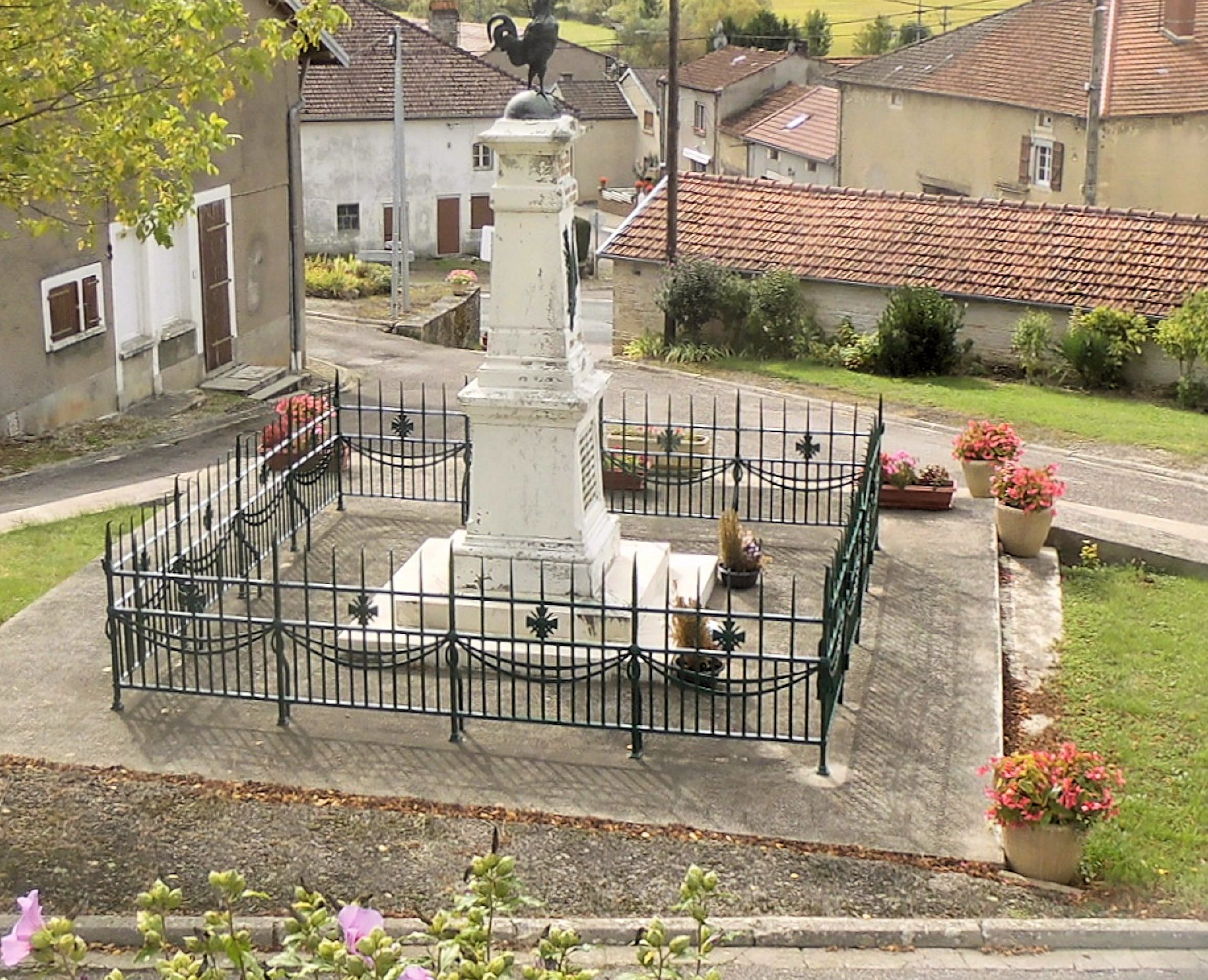 Monument aux morts à Levécourt